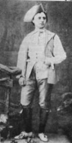 Pavel Gert - Interprétation de Colas dans l"La fille mal gardée"